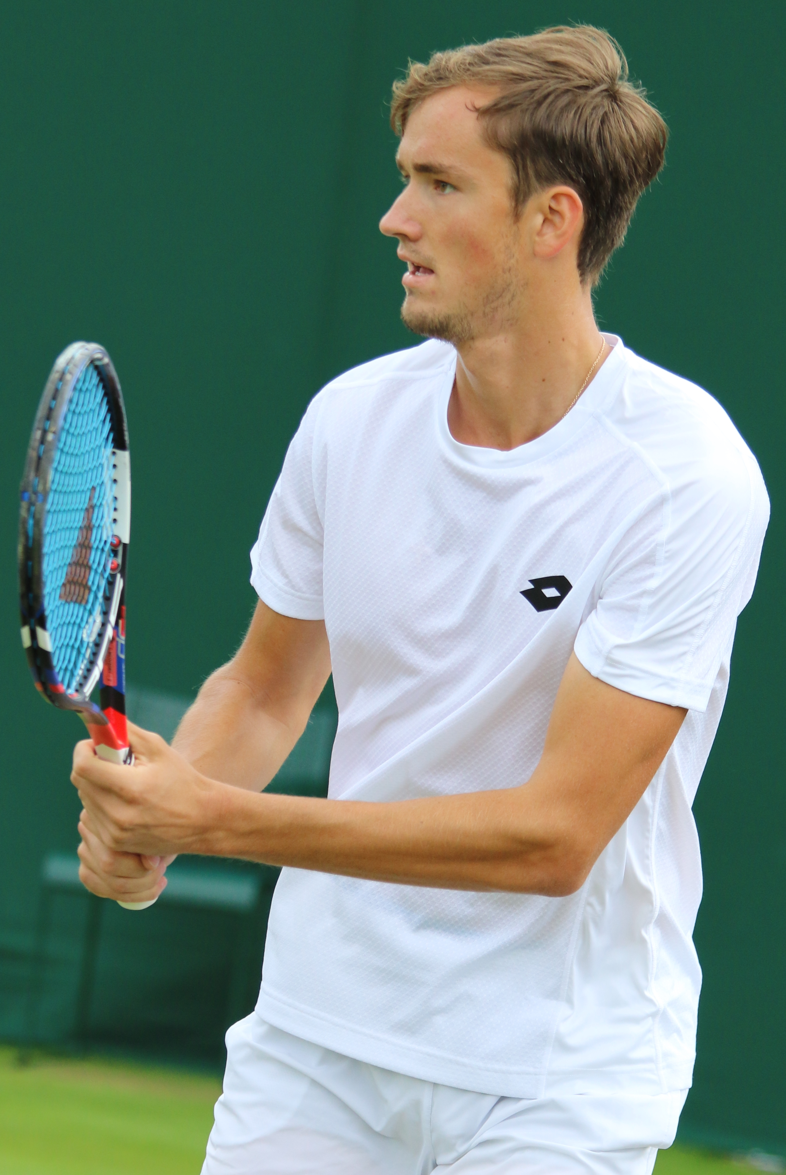 Medvedev WM17 (7)